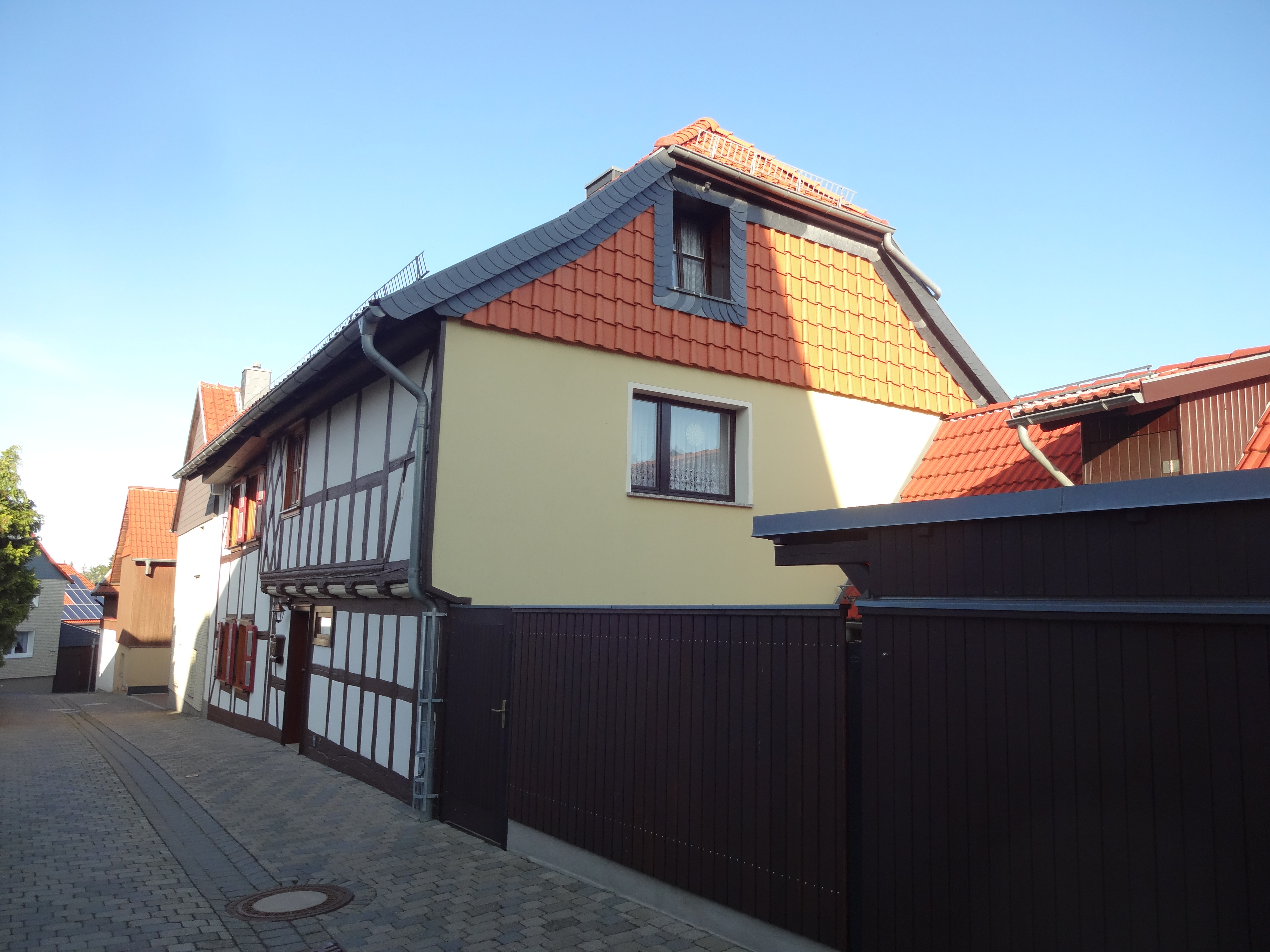 denkmalgeschütztes Wohnhaus in der Straße Winkel 3 im Heimburg